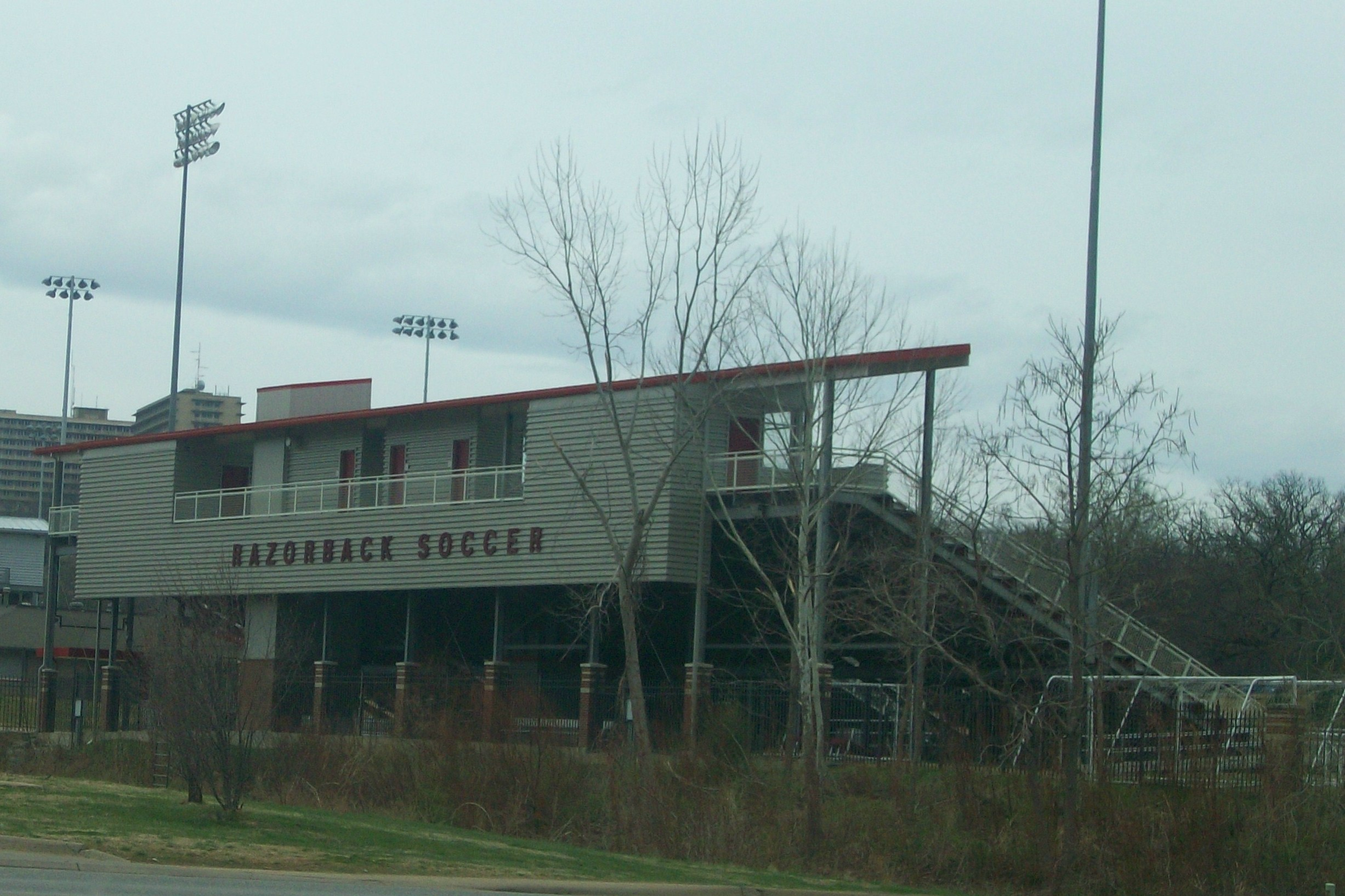 Razorback Soccer Stadium